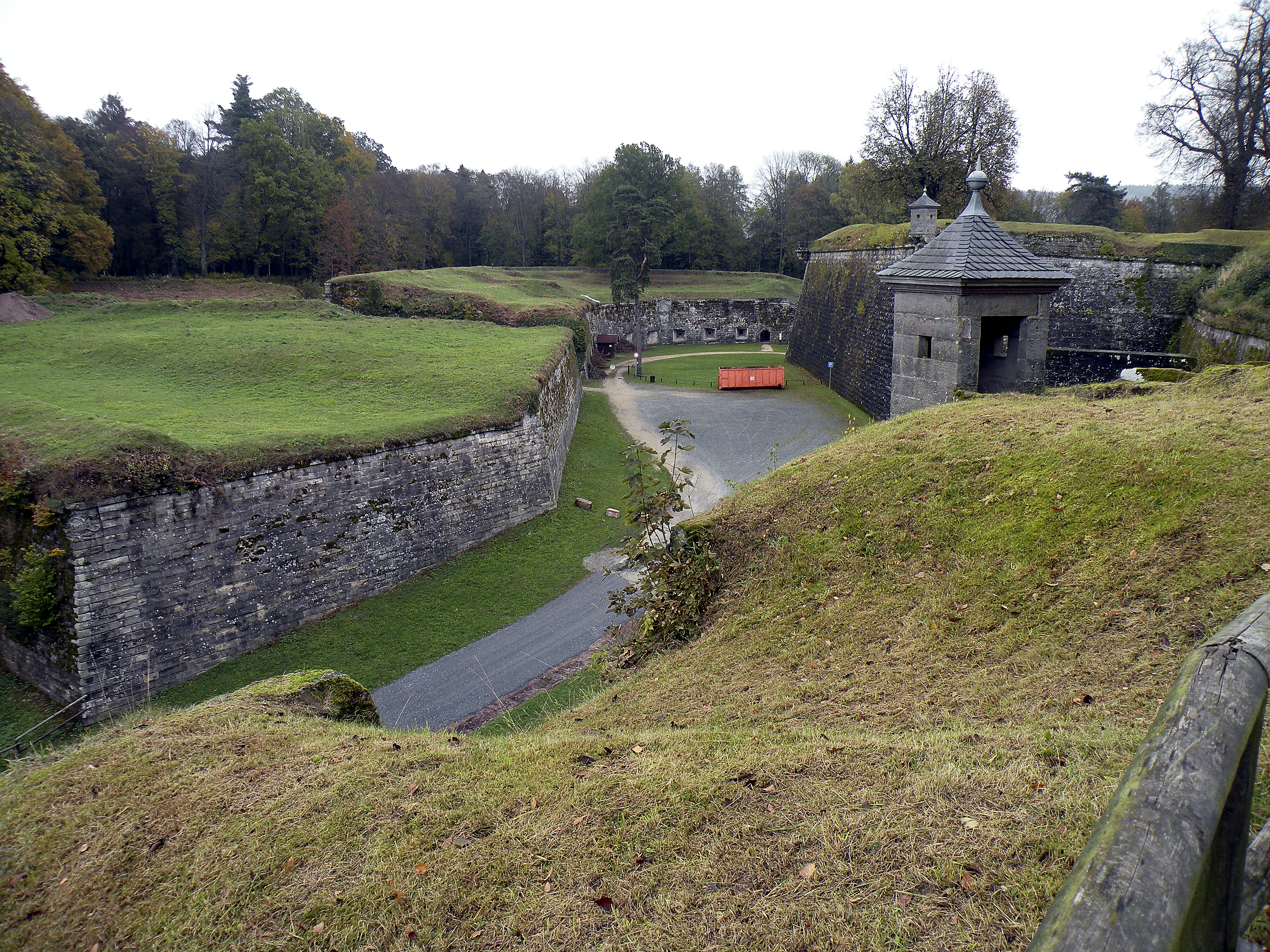 Festung Rosenberg in Kronach. Blick von der Bastion St. Valentin auf die beiden Vorwerke Ravelin Anton (links) und Contregarde Carl (Bildmitte hinten) und die Bastion St. Lothar (rechts hinten).